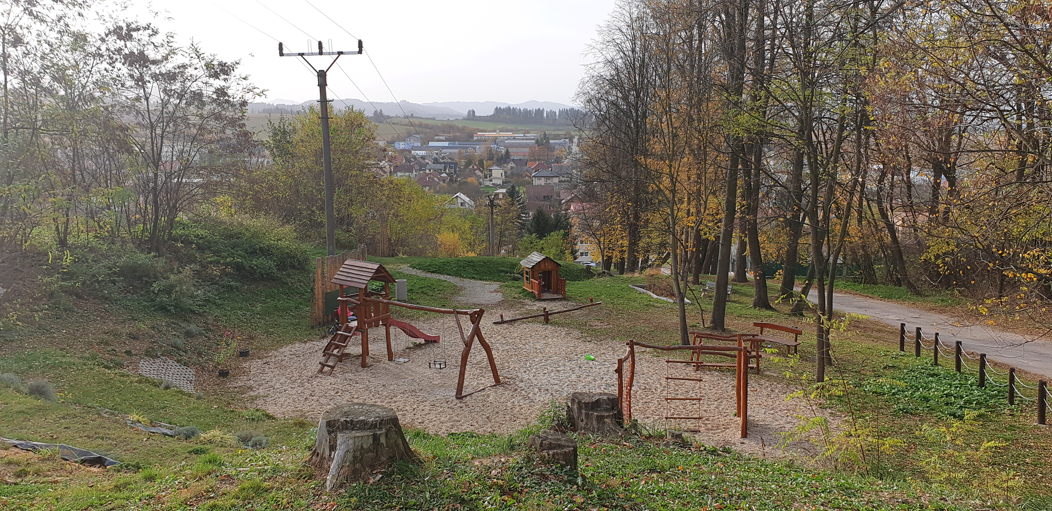 Oddychová zóna Skotňa Rosina NOVÉ